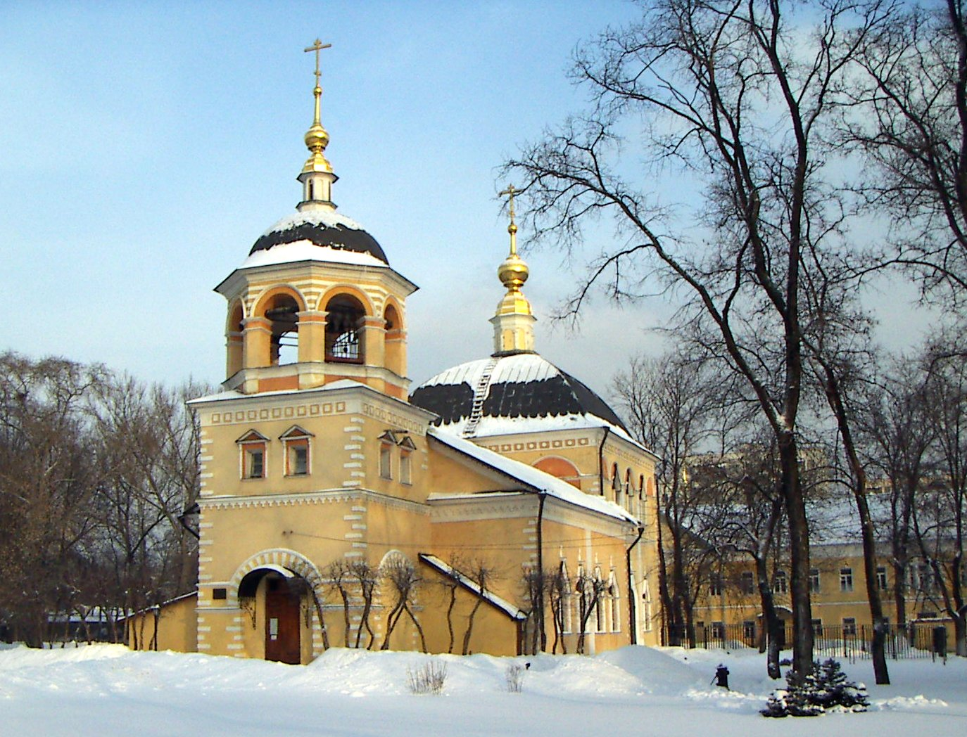 Церковь Воздвижения Креста Господня на Преображенском кладбище Преображенской старообрядческой общины